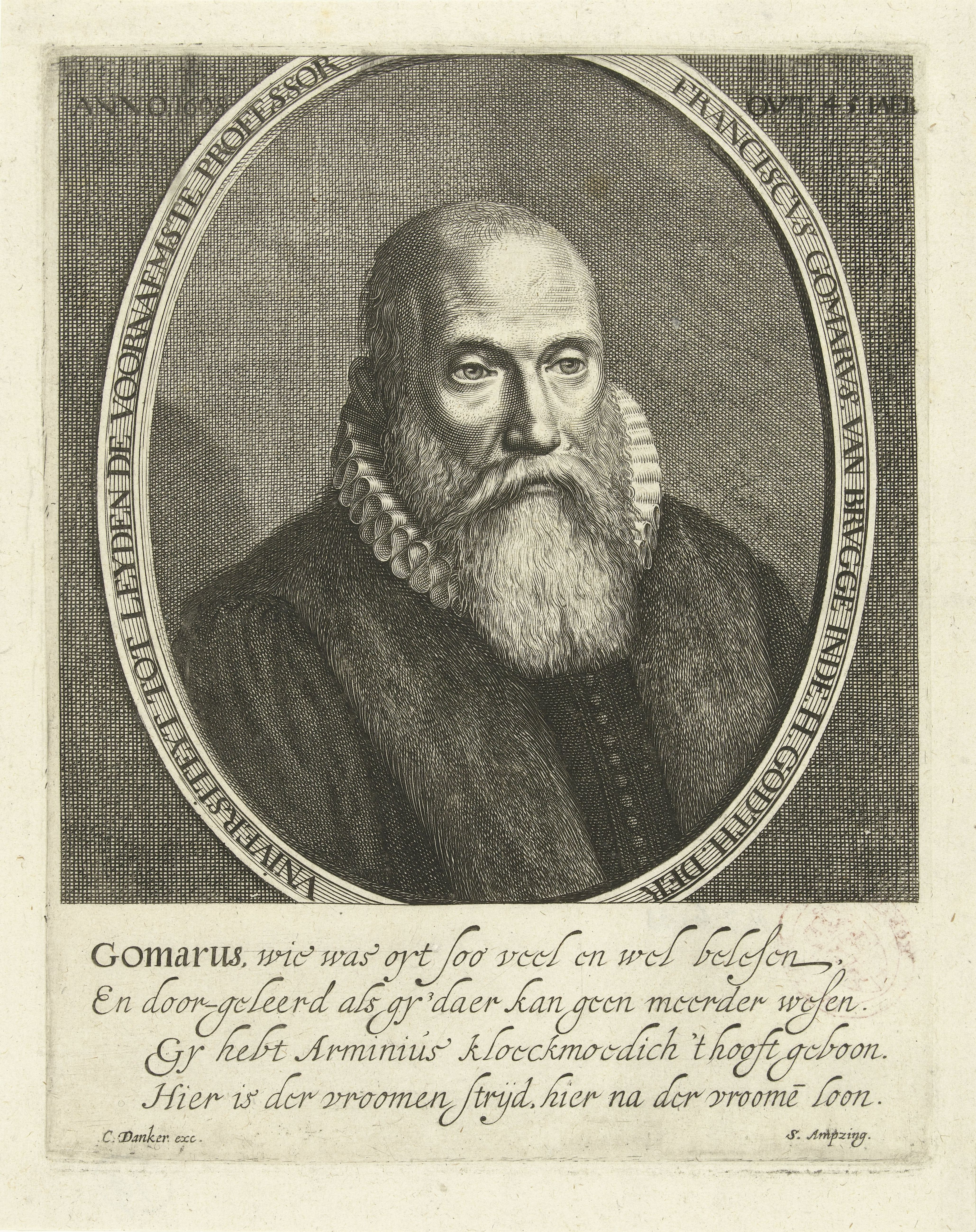 IdentificatieTitel(s): Portret van Franciscus GomarusObjecttype: prent Objectnummer: RP-P-BI-6183Catalogusreferentie: Hollstein Dutch 9FMP 1903Opschriften / Merken: verzamelaarsmerk, verso, gestempeld: Lugt 240Omschrijving: Borstbeeld van Franciscus Gomarus op 48-jartige leeftijd. In ovaal met randschrift. Onder het portret een Nederlands vers op Gomarus door S. Ampzing.VervaardigingVervaardiger: prentmaker: Cornelis Koning (?-1671)uitgever: Cornelis Danckerts (I) (vermeld op object)schrijver: Samuel Ampzing (vermeld op object)Plaats vervaardiging: prentmaker: Haarlemuitgever: AmsterdamDatering: in of na 1608Fysieke kenmerken: gravureMateriaal: papier Techniek: graveren (drukprocedé)Afmetingen: plaatrand: h 213 mm × b 170 mmOnderwerpWie: Franciscus GomarusVerwerving en rechtenVerwerving: overdracht van beheer 1815Copyright: Publiek domein